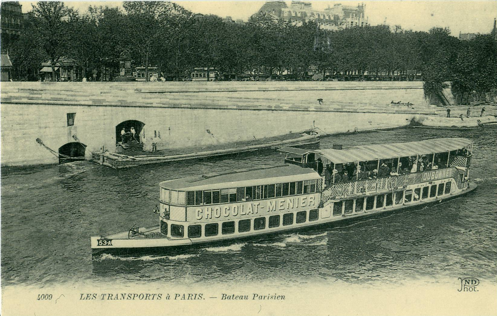 Carte postale ancienne éditée par ND N°4009Les transports à Paris - Bâteau parisien